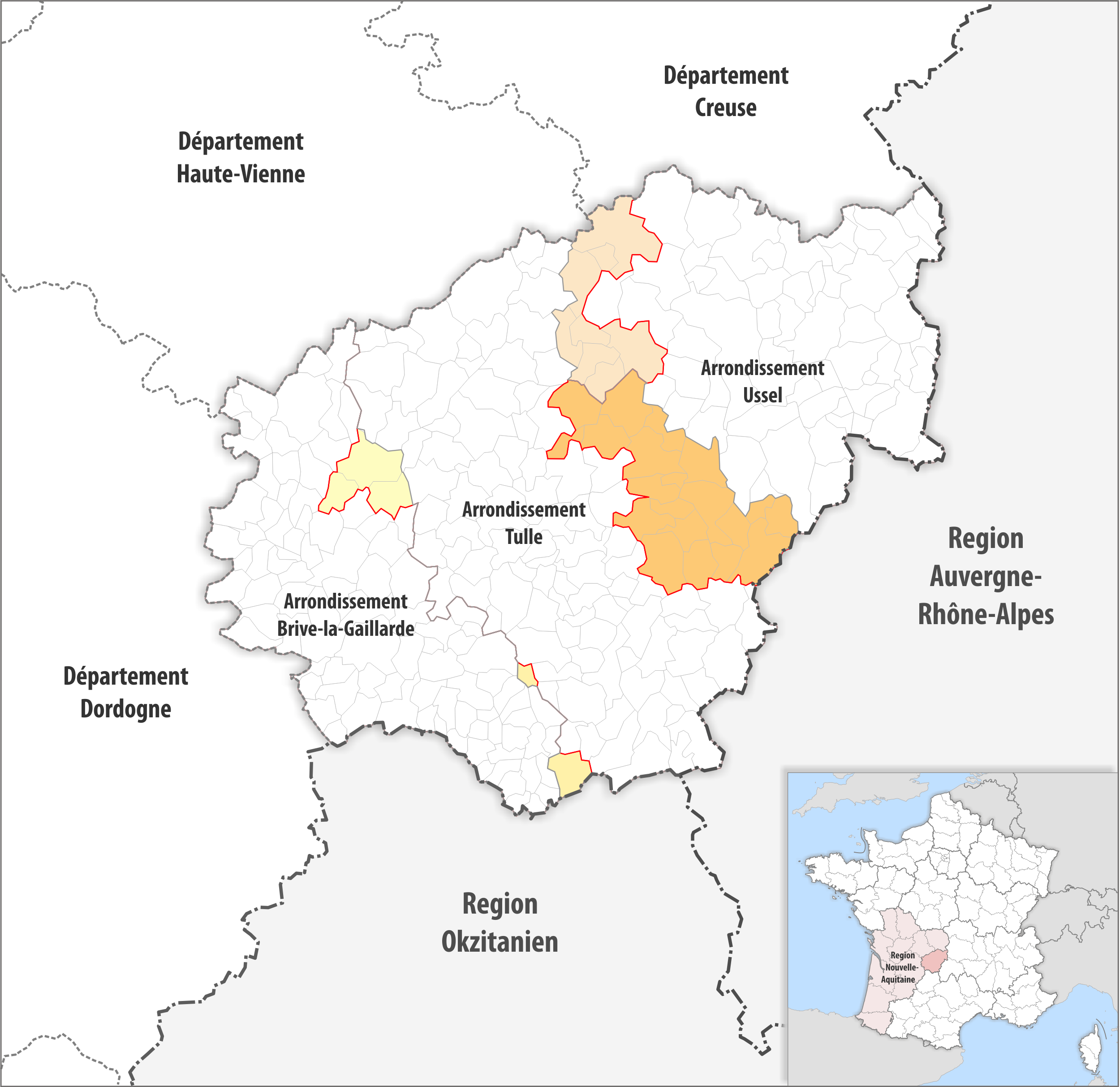 Arrondissements Anpassungen auf 2017 im Departement Corrèze